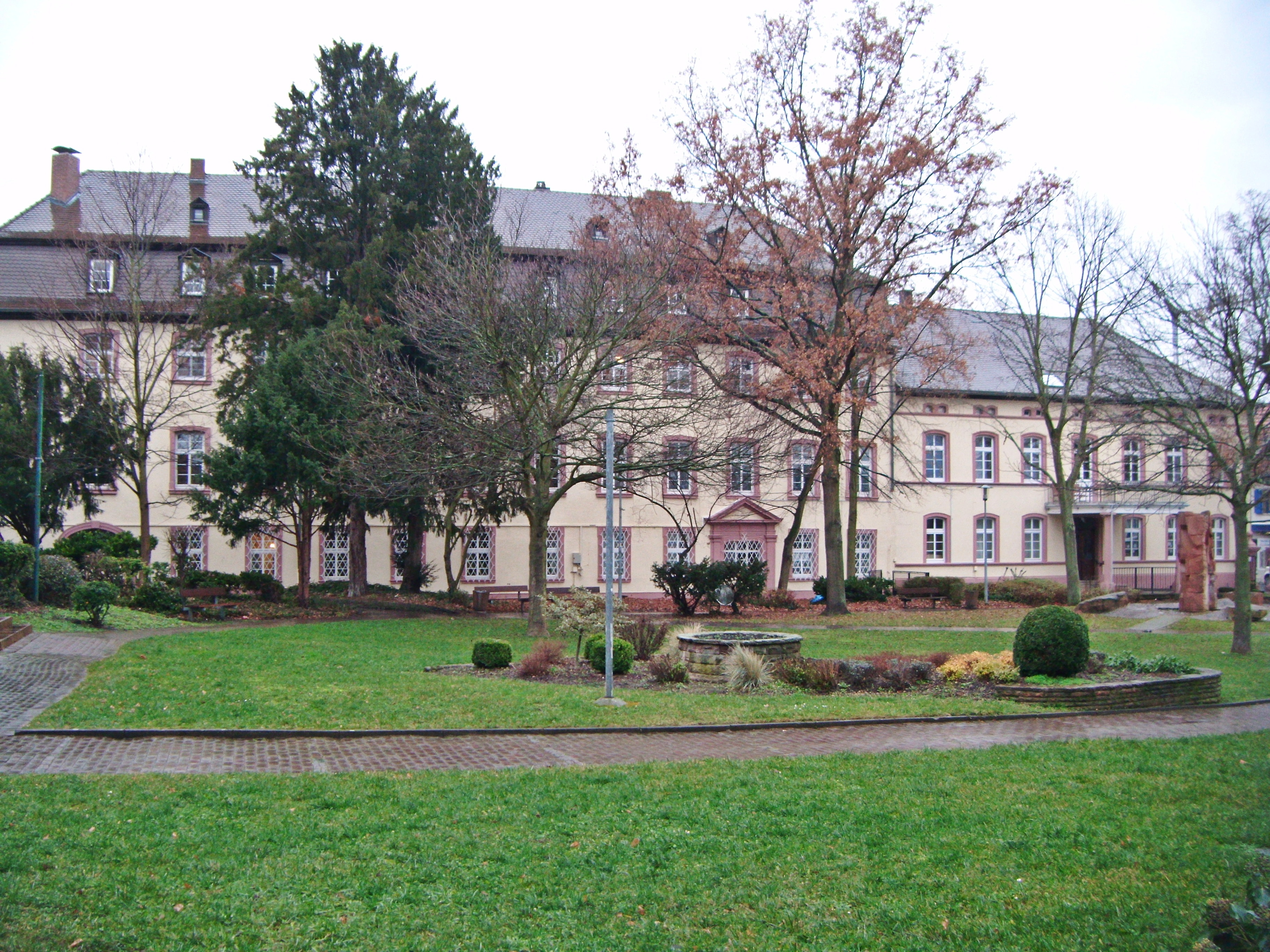 Grünstadt, Schloss Unterhof der Grafen von Leiningen, zuvor als "Lungenfelder Hof" ehemalige Propstei der Abtei Glandern in Lothringen